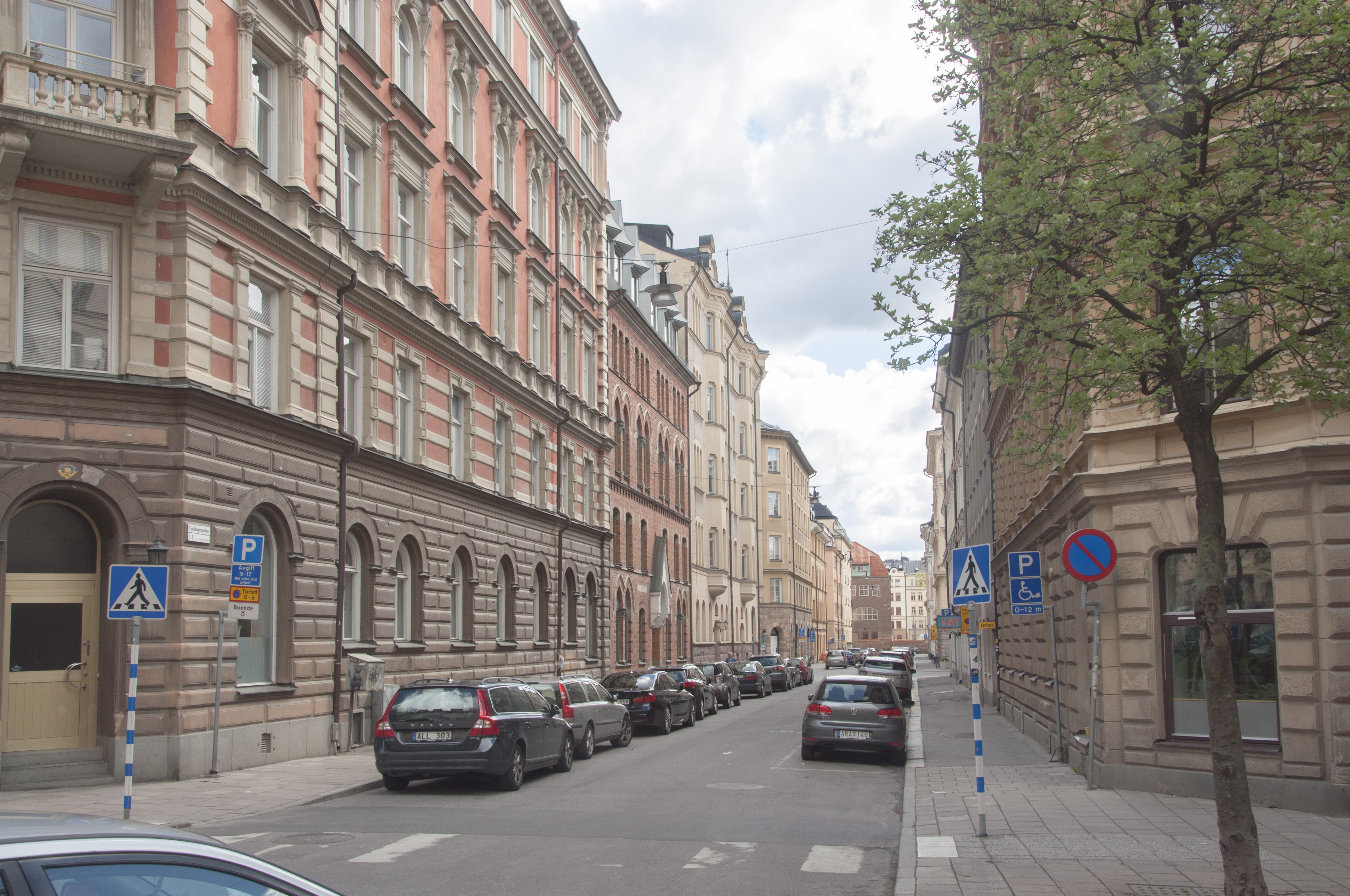 Tyskbagargatan